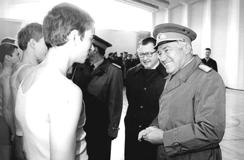 NVA-Truppenbesuch Hoffmann ADN-ZB Kluge 17.11.82 DDR: Truppenbesuch Armeegeneral Heinz Hoffmann (r.), Mitglied des Politbüros des ZK der SED und Minister für Nationale Verteidigung der DDR, weilte zu einem Truppenbesuch im Fla-Raketenregiment "Kurt Kresse". Im Beisein des 1.Sekretärs der SED-Bezirksleitung Halle, Joachim Böhme (2.v.r.), sprach er auch mit Soldaten während des Sportunterrichts. Abgebildete Personen: Hoffmann, Heinz: Minister für Nationale Verteidigung, Mitglied des ZK der SED, DDR (GND 118552503)